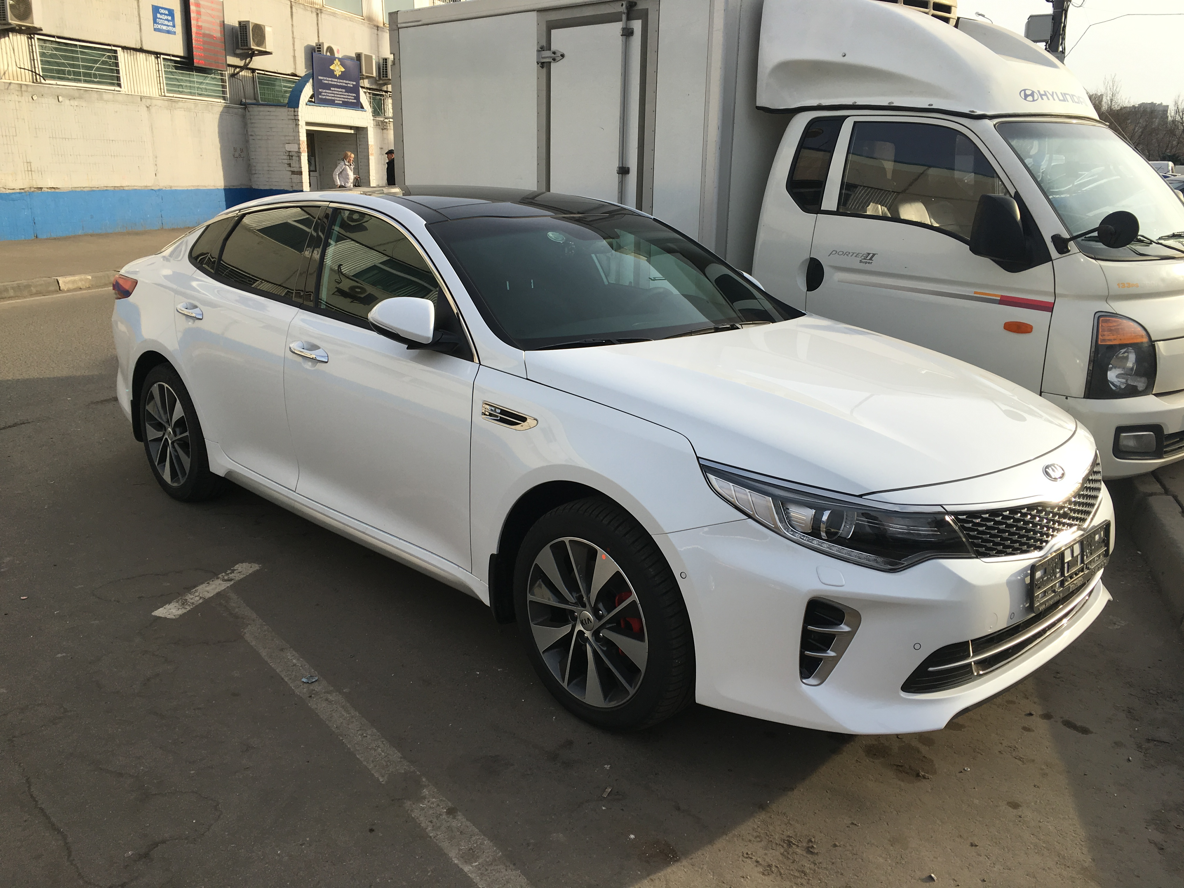 Kia optima IV 2016 GT Line 2.4. / 188